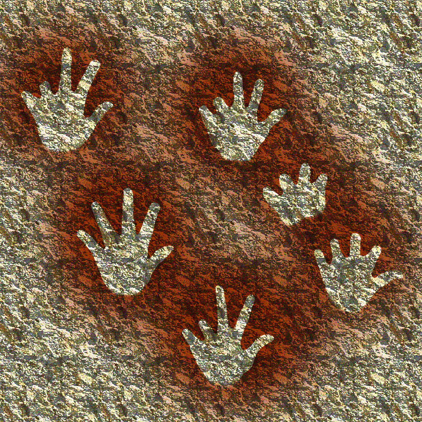 Manos en negativo de la cueva de Gargas (Hautes-Pyrénées, Francia)